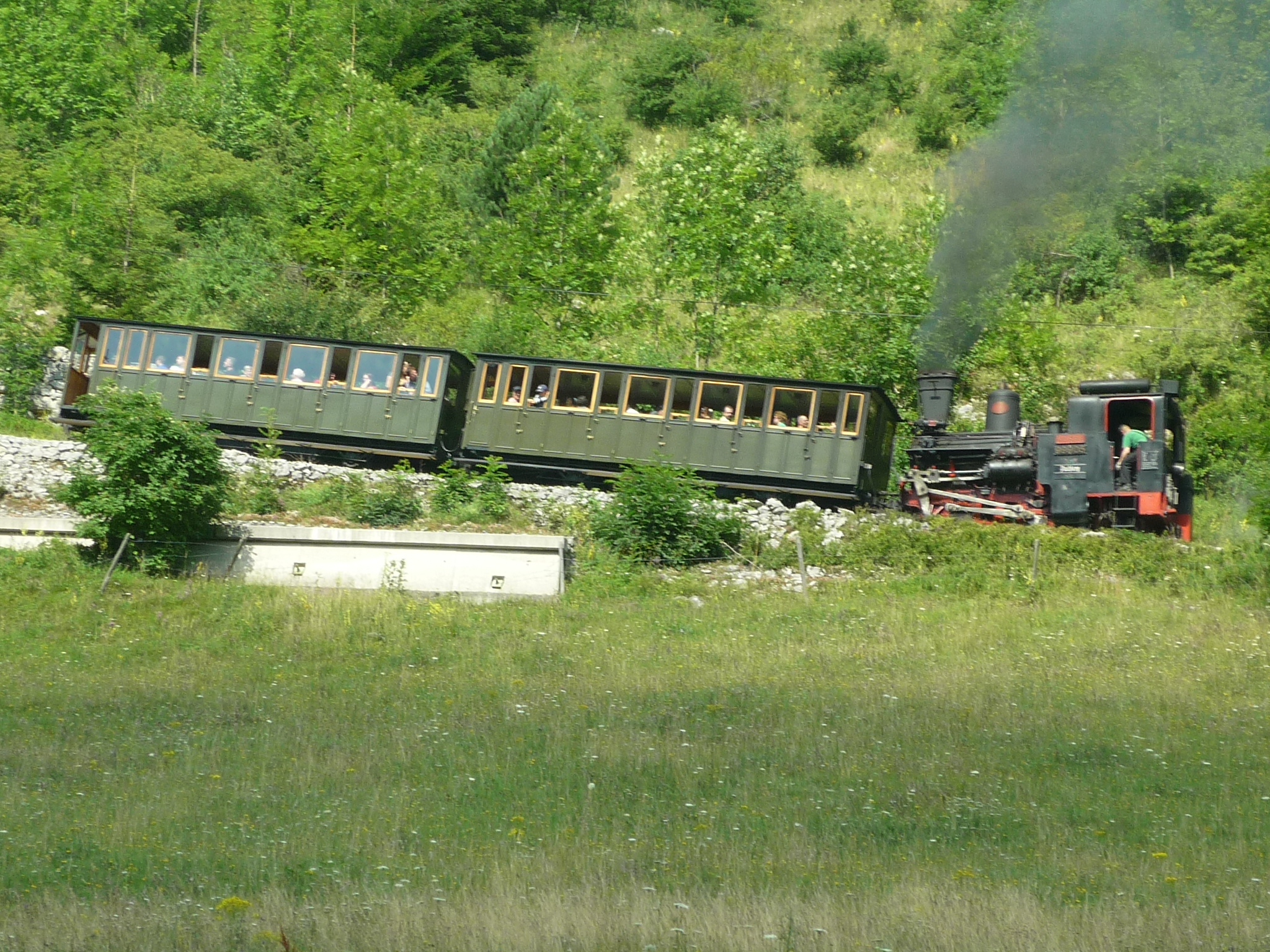 Die Dampflok "Puchberg" geht auf Reisen in Puchberg am Schneeberg